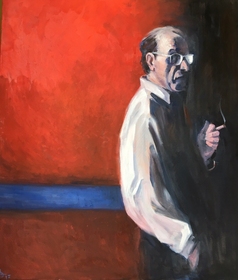 Mark Rothko. Painter Olesya Aleksandrovna Denisova